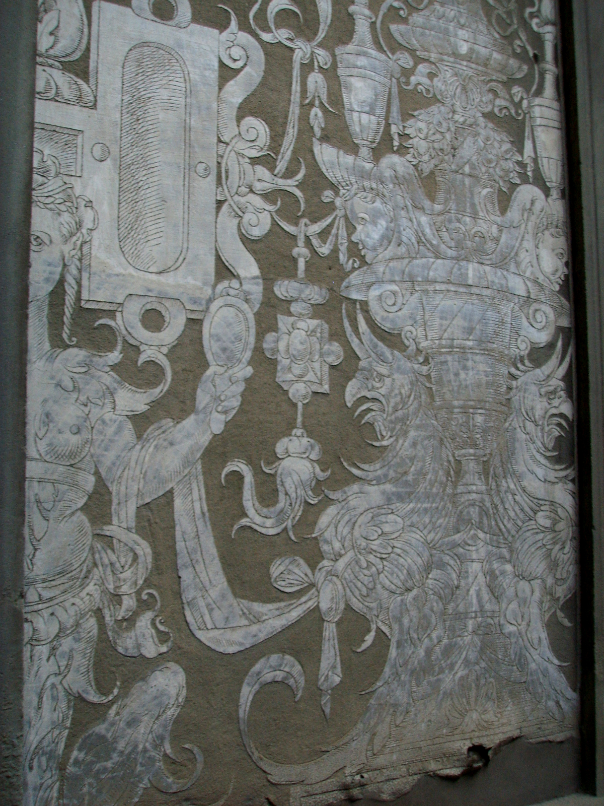 Palazzo Bartolini Salimbeni, graffiti cortile 01